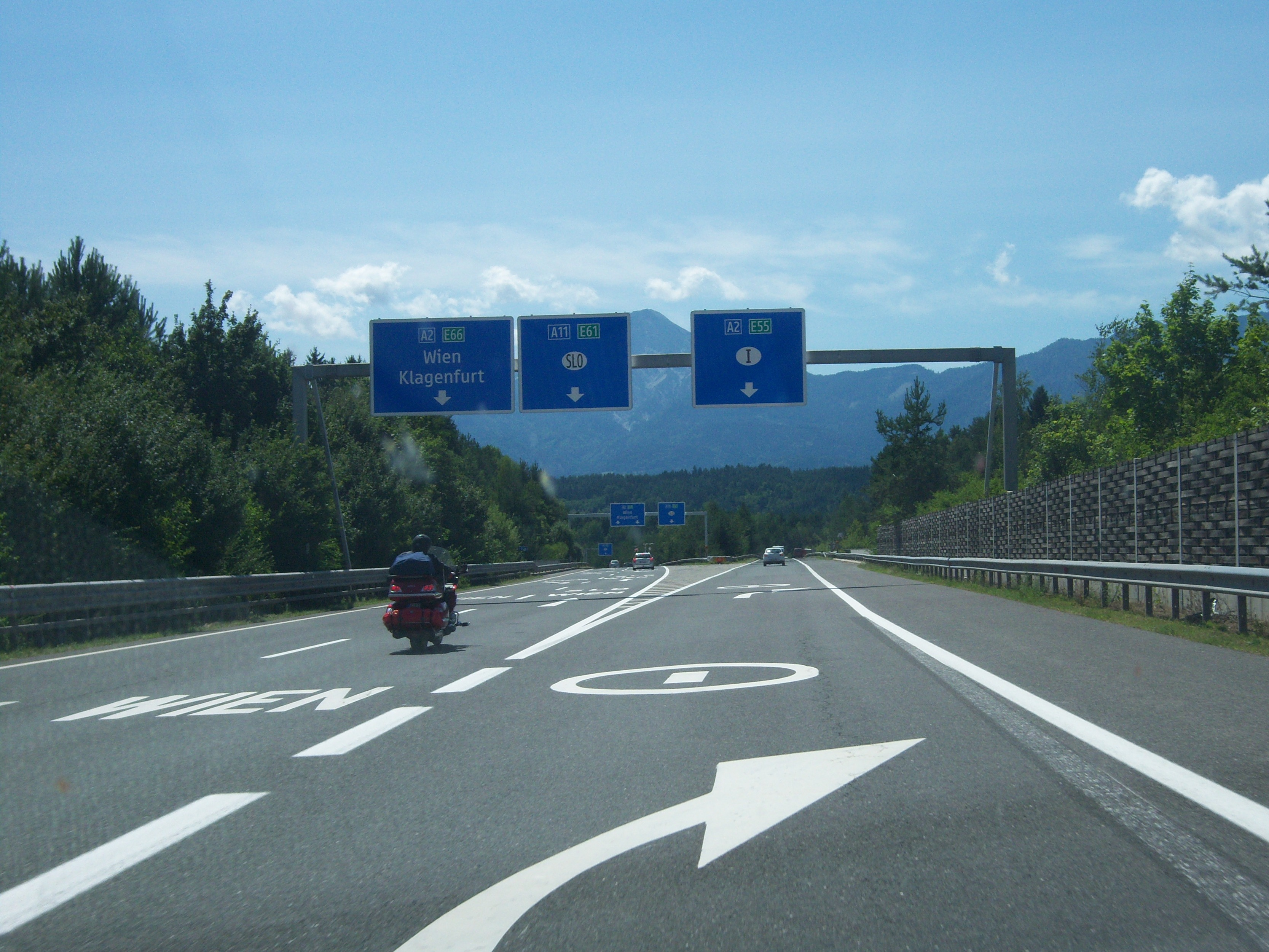 Tauern Autobahn A10 Richtung Villach am Knoten Villach